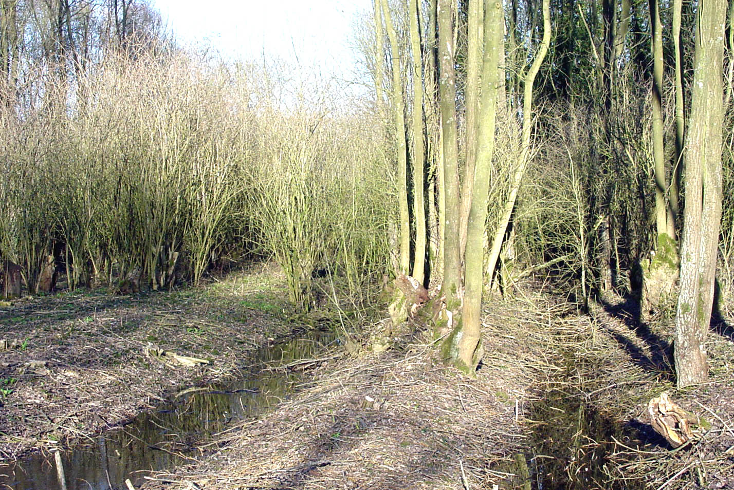 fossés et plantations de saules ou peupliers ont longtemps été les principaux moyens de drainage